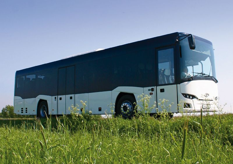 InterUrbino